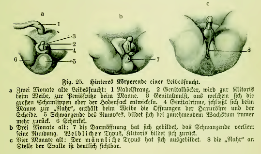 Fig. 25. Hinteres Körperende einer Leibesfrucht. a Zwei Monate alte Leibesfrucht: 1 Nabelstrang. 2 Genitalhöcker, wird zur Klitoris beim Weibe, zur Penisspitze beim Manne. 3 Genitalwulst, aus welchen sich die großen Schamlippen oder der Hodensack entwickeln. 4 Genitalrinne, schließt sich beim Manne zur "Naht", enthält beim Weibe die Öffnungen der Harnröhre und der Scheide. 5 Schwanzende des Rumpfes, bildet sich bei zunehmenden Wachstum immer mehr zurück. 6 Schenkel. b Drei Monate alt: 7 die Darmöffnung hat sich gebildet, das Schwanzende verliert seine Rundung. Weiblicher Typus, Klitoris bildet sich zurück. c Vier Monate alt: Der männliche Typus hat sich ausgebildet. 8 die "Naht" an Stelle der Spalte ist deutlich sichtbar.